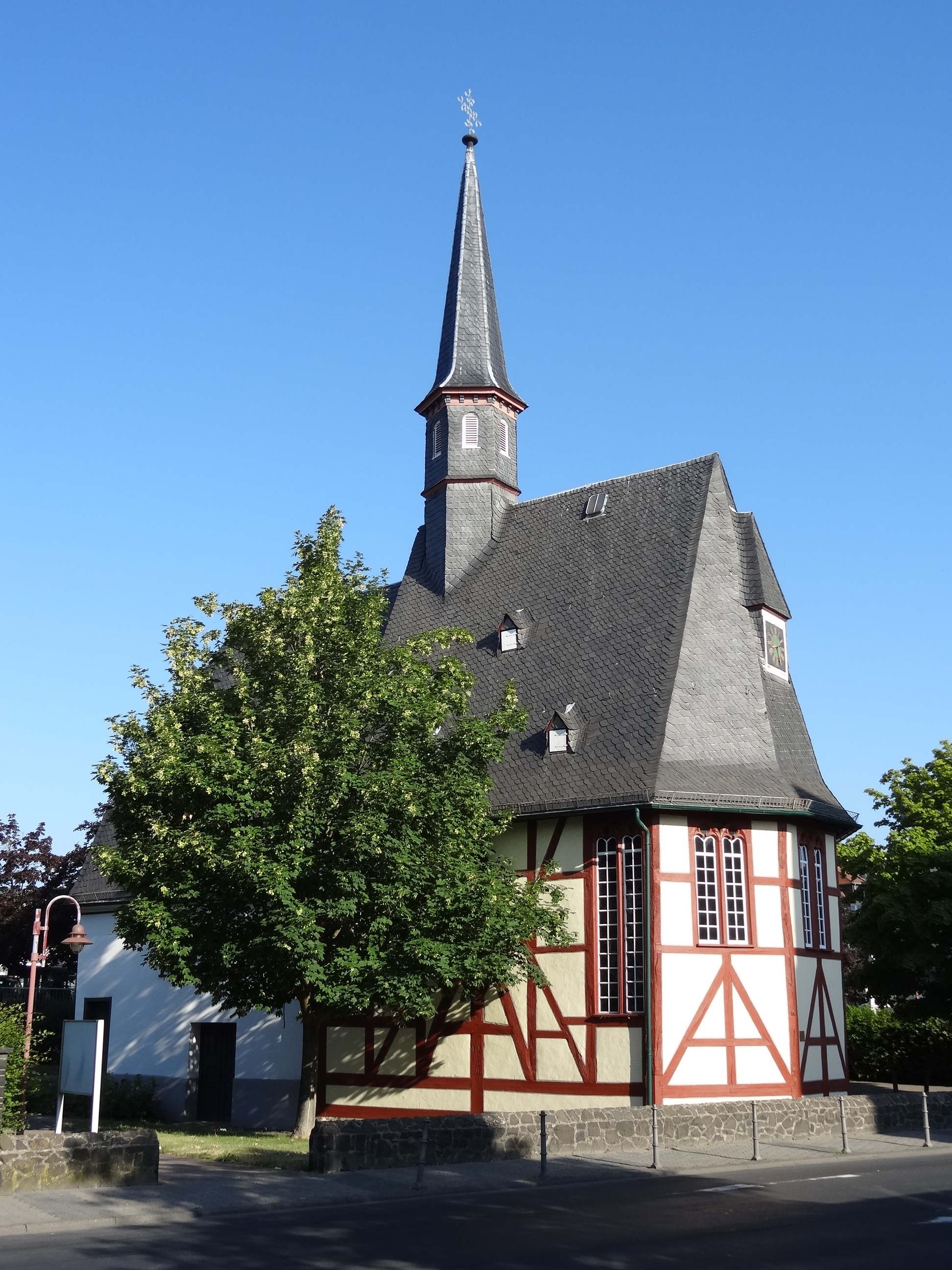 Ehemalige Hospitalkapelle St. Wendelin (Butzbach)